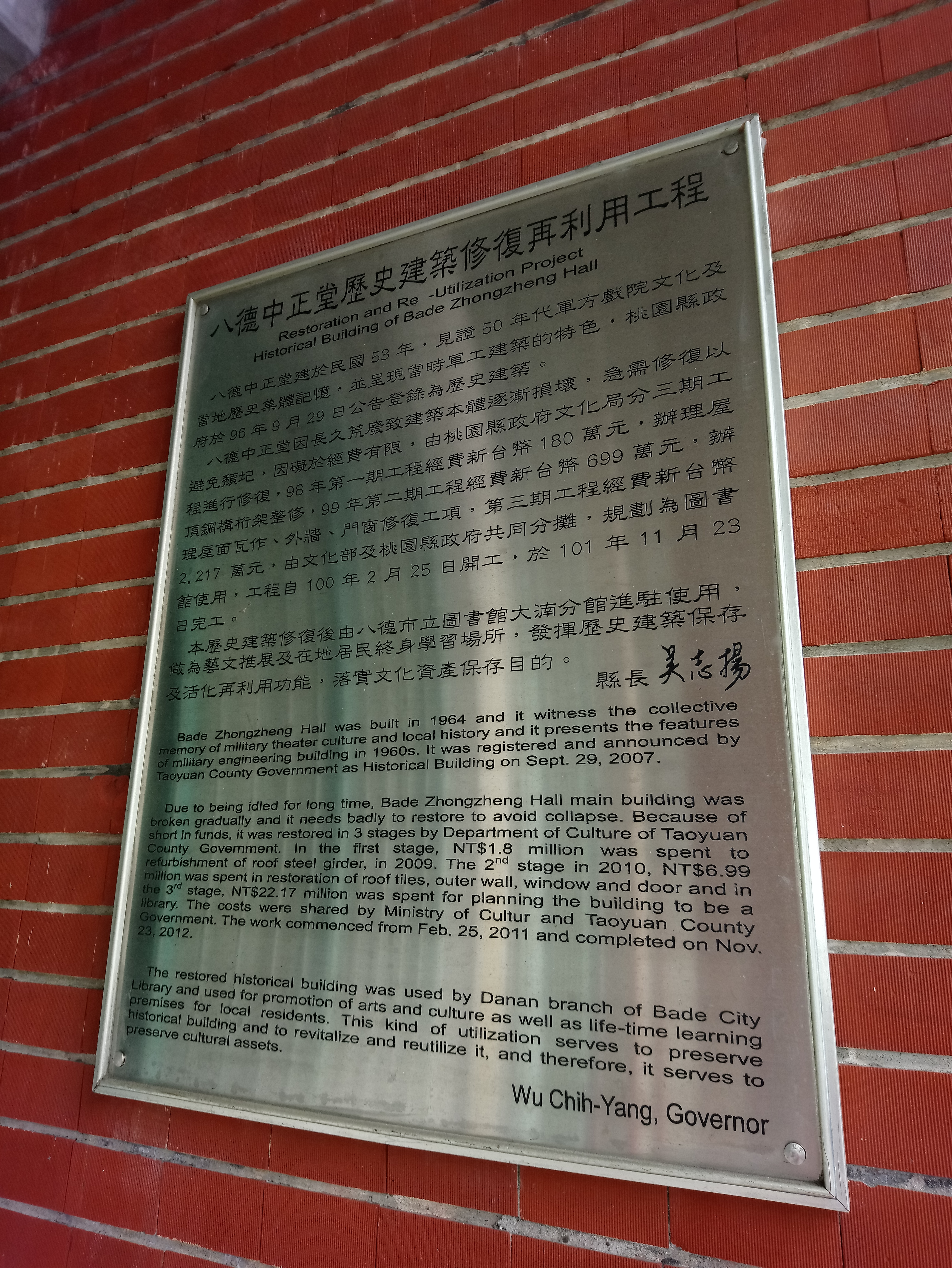 八德中正堂(今桃園市立圖書館大湳分館)簡介銘版,桃園市八德區大愛里